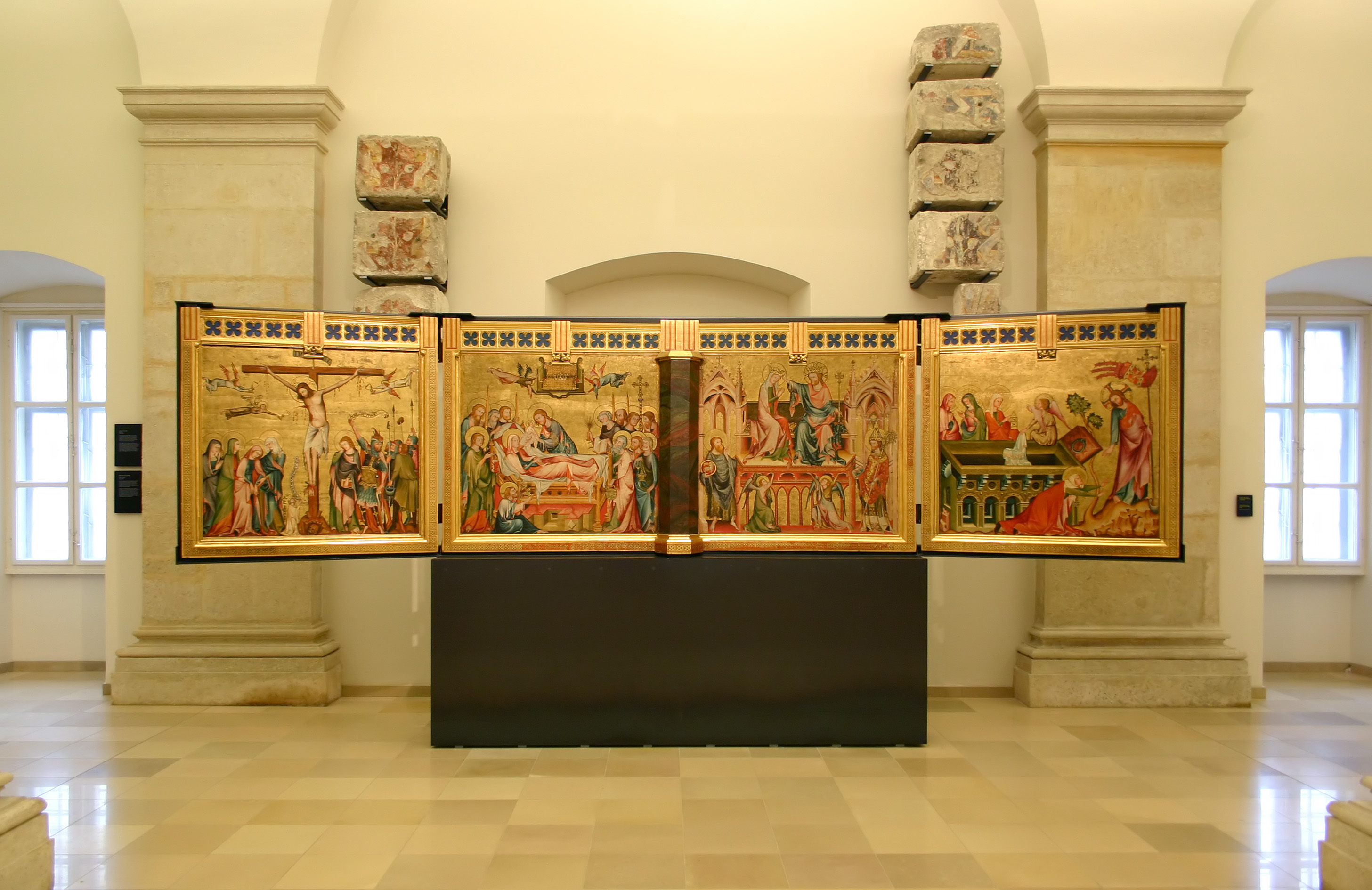 Der Verduner Altar von 1181, Klosterneuburg, hier die Rückseite mit 4 Temperagemälde von 1331